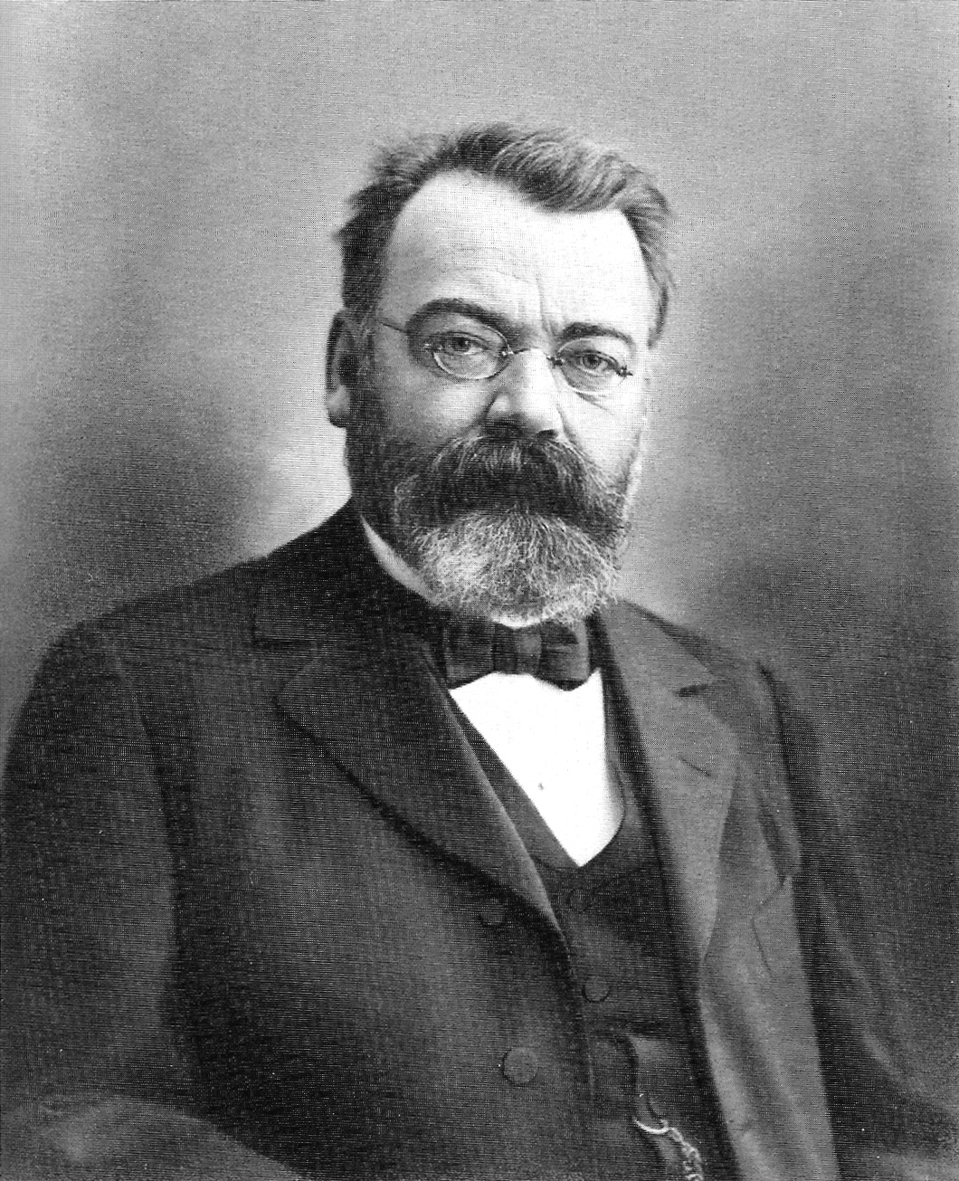 Hans Wilhelm Auer, Architekt des Bundeshauses in Bern